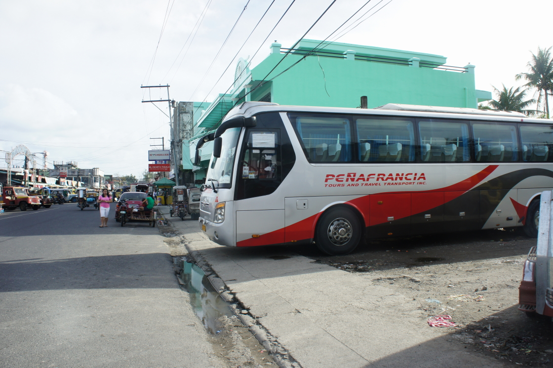 Gubat, Sorsogon, Philippines